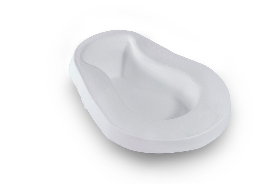 Bettpfanne aus Zellulose